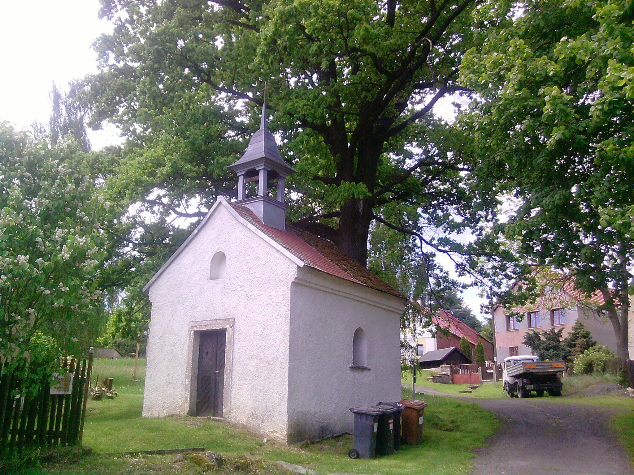 364 71 Bochov, Czech Republic